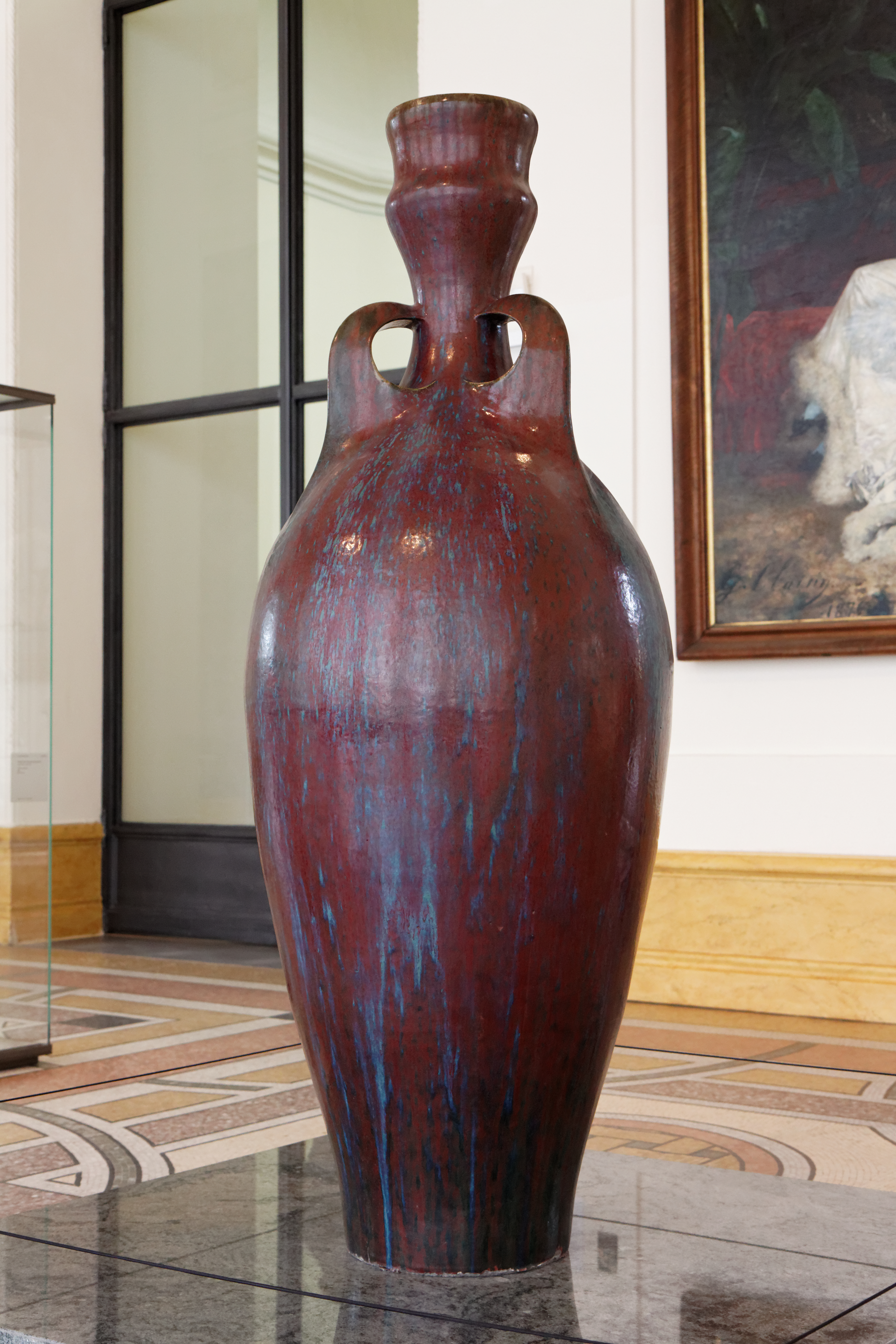 Un vase en grès émaillé réalisé par Pierre-Adrien Dalpayrat (1844-1910).